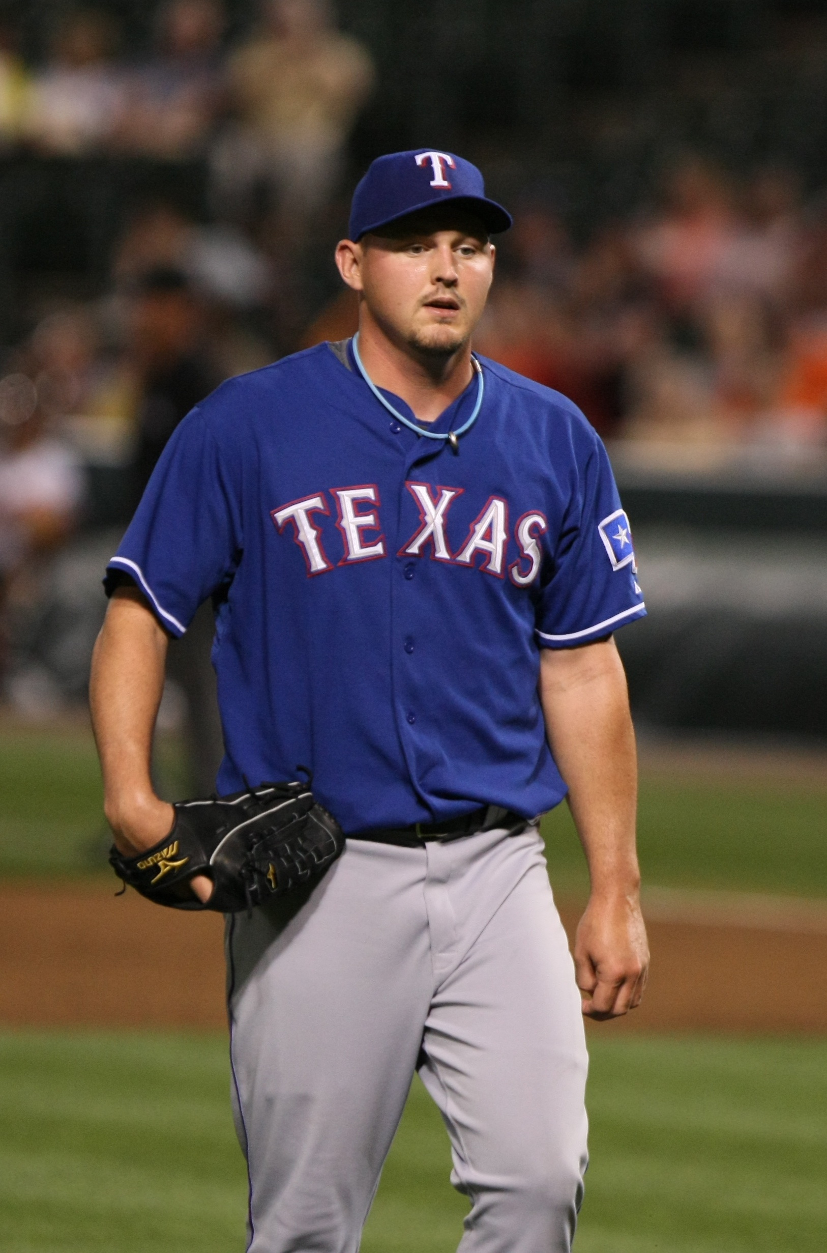 Matt Harrison